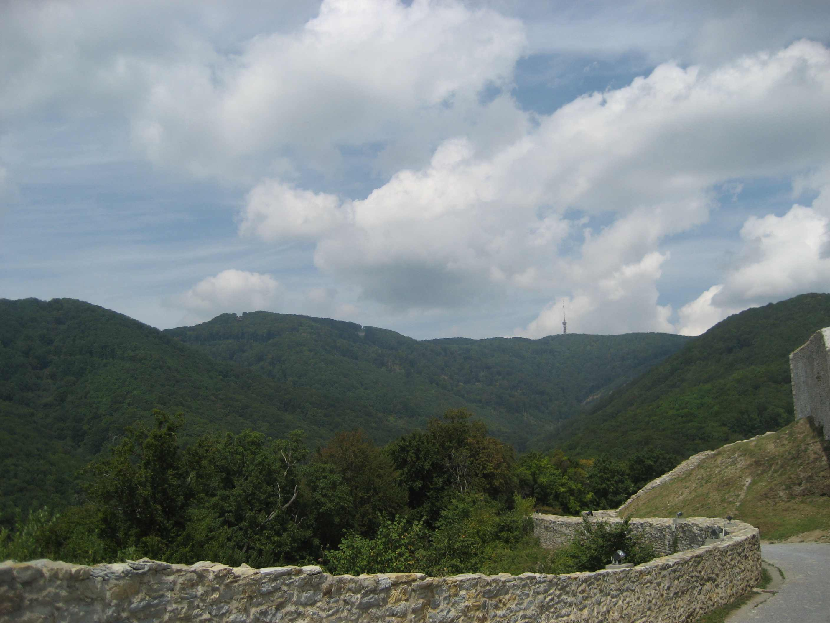 Medvednica, near Zagreb, Croatia